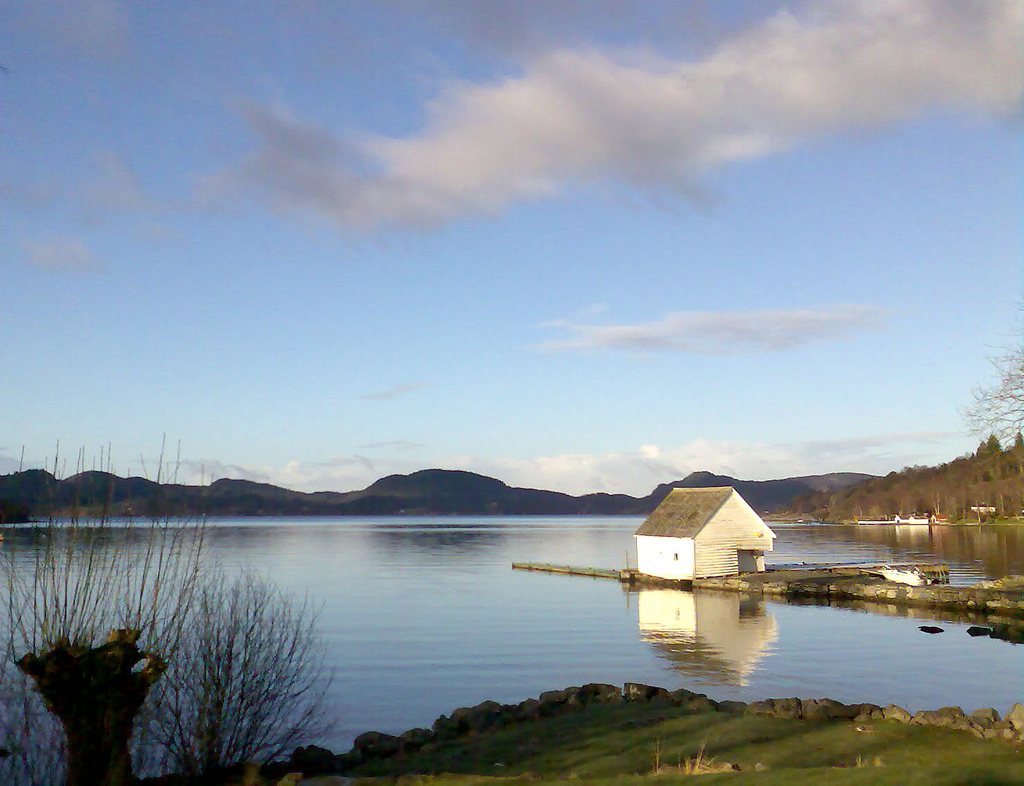 Vikebygd in Vindafjord, Norway. Original description: Grunn god nok til å være oppe samtidig med hanen.